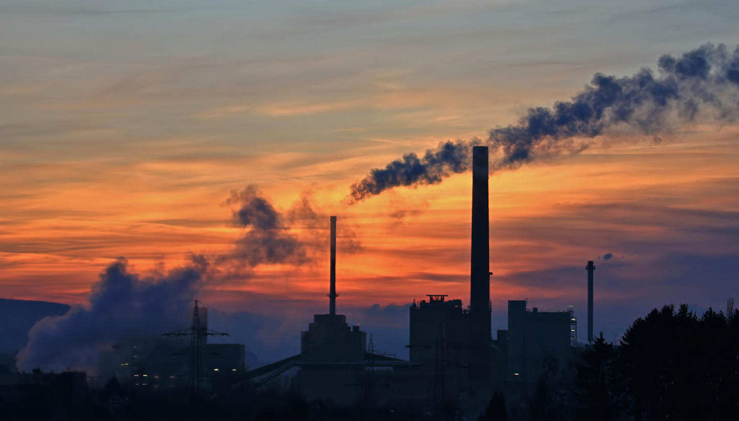 Das Elektrizitäts -und Fernwärmewerk (ehem. Elektrizitätswerk Wesertal) in Hameln-Afferde bei Sonnenuntergang